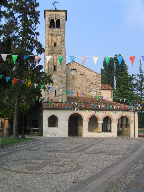 Chiesa di Tempio di Ormelle, Treviso, Veneto, Italia. Church of Tempio di Ormelle, Treviso, Veneto, Italy.